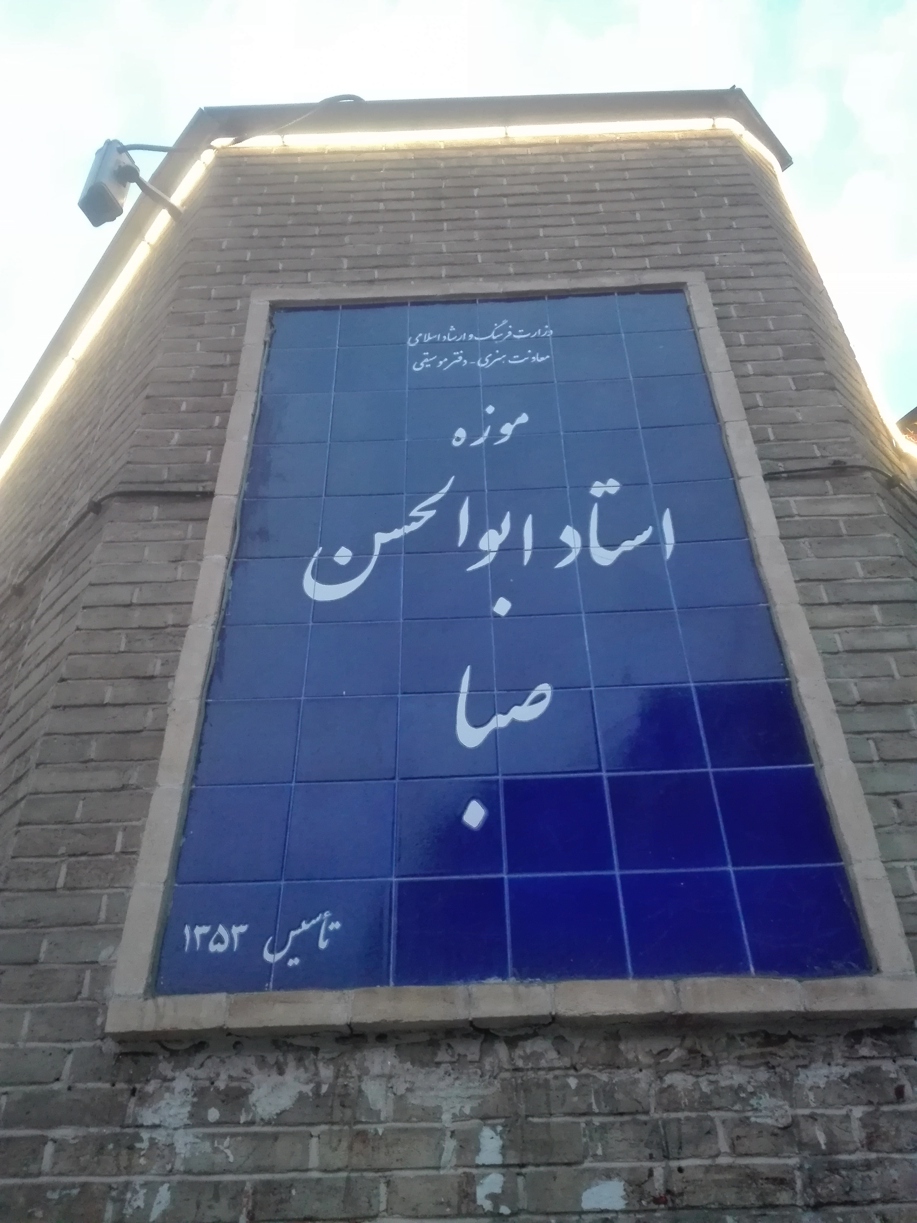 خانه استاد ابوالحسن صبا